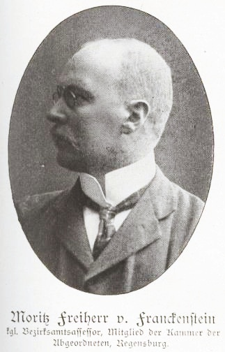 Moritz von und zu Franckenstein (1869-1931), bayerischer Freiherr und Landtagsabgeordneter (Zentrum)